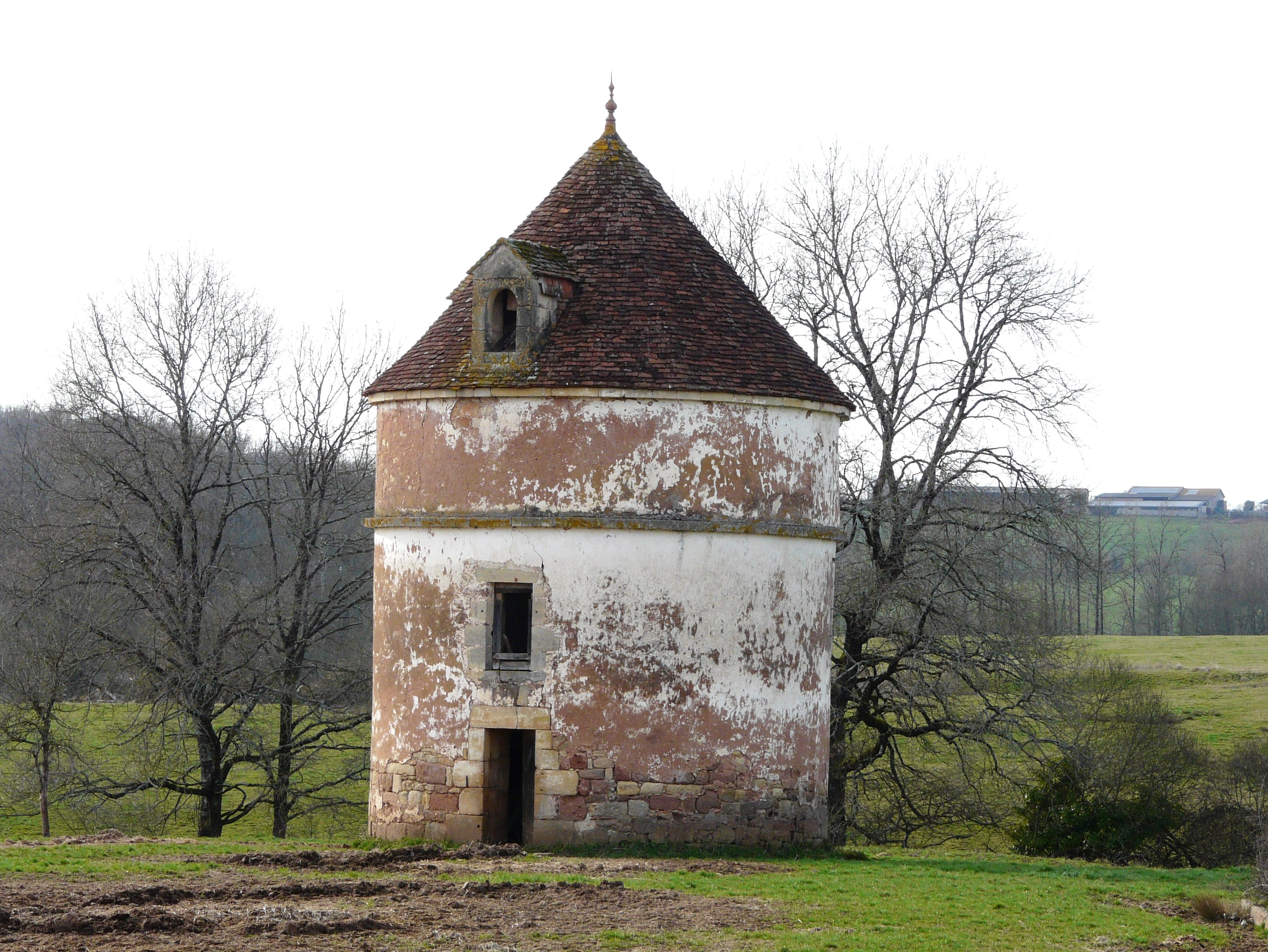 Le pigeonnier de l'abbaye de Dalon, Sainte-Trie, Dordogne, France.